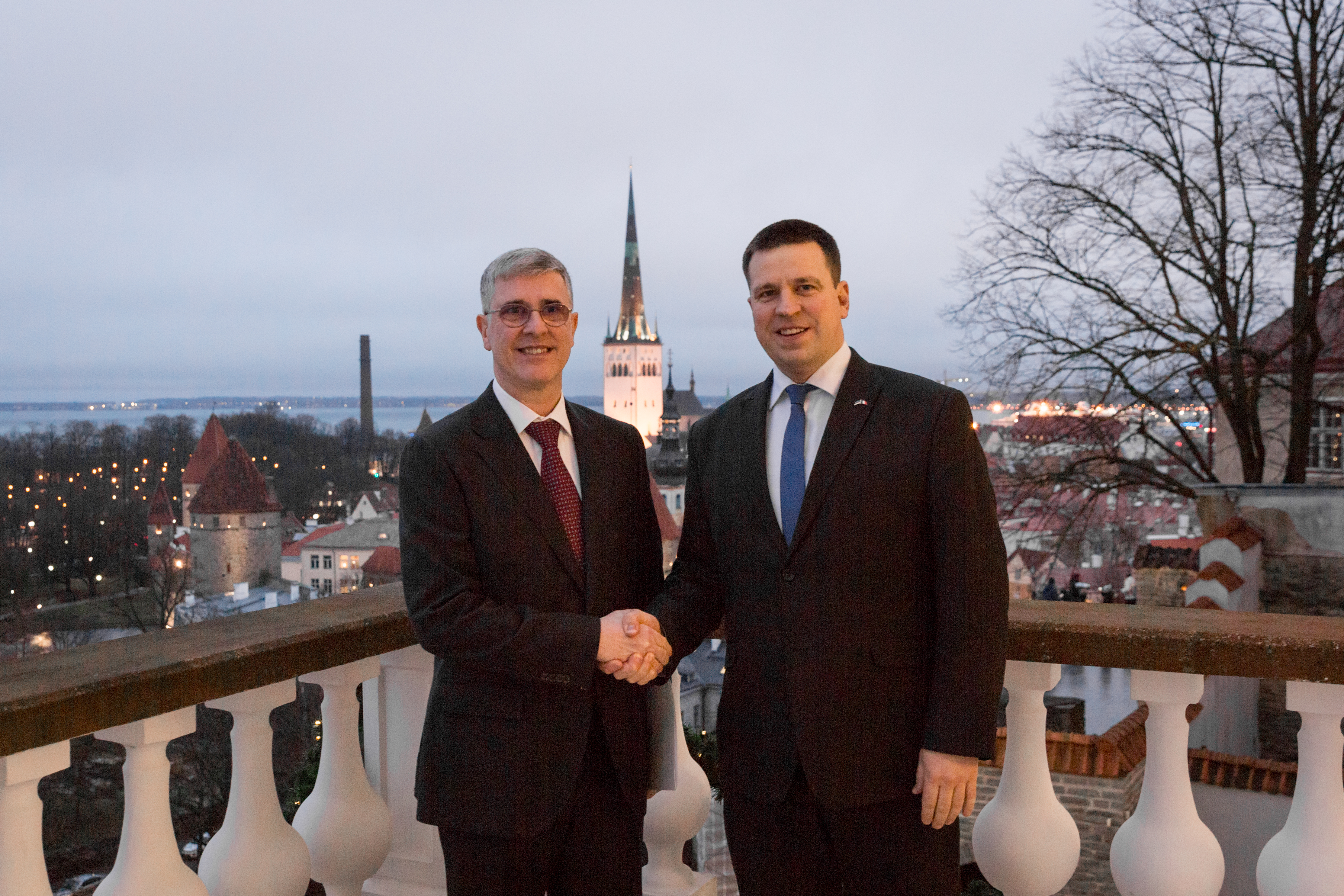 Itaalia suursaadik Daniele Rampazzo Stenbocki majas